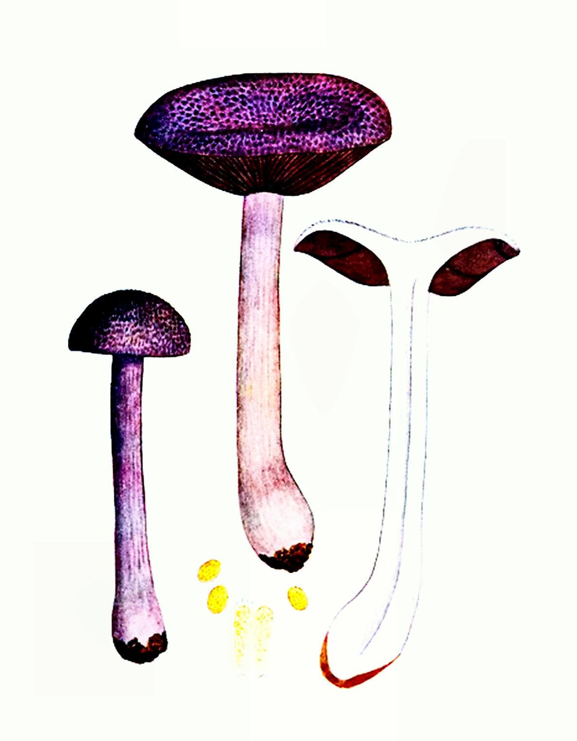 Giacomo Bresadola: Cortinarius violaceus